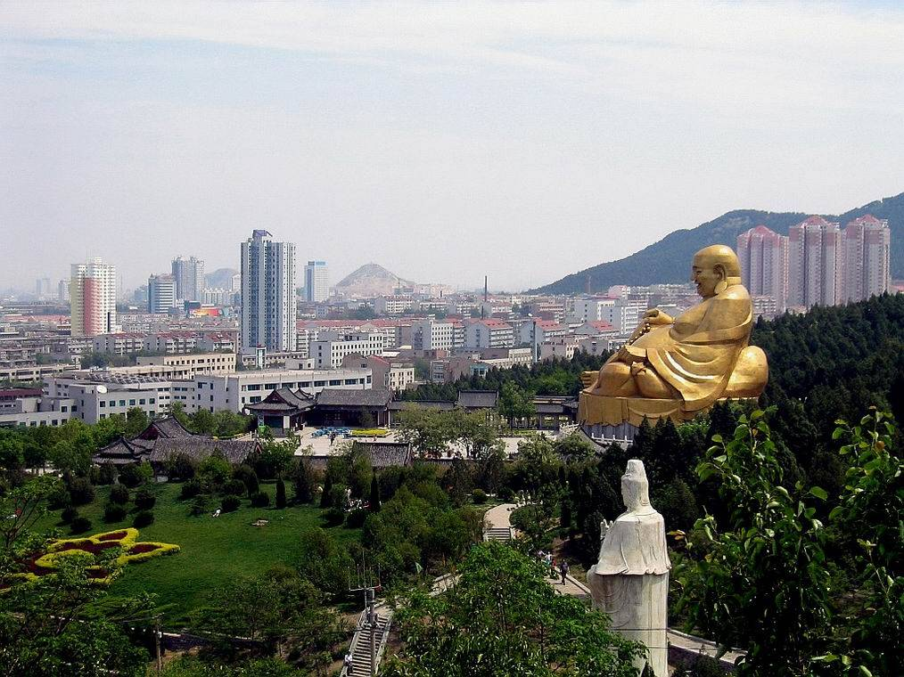 千佛山公园 东部的坐佛 右下是观音菩萨像，千佛山公园位于山东济南，其中寺院有千年历史。